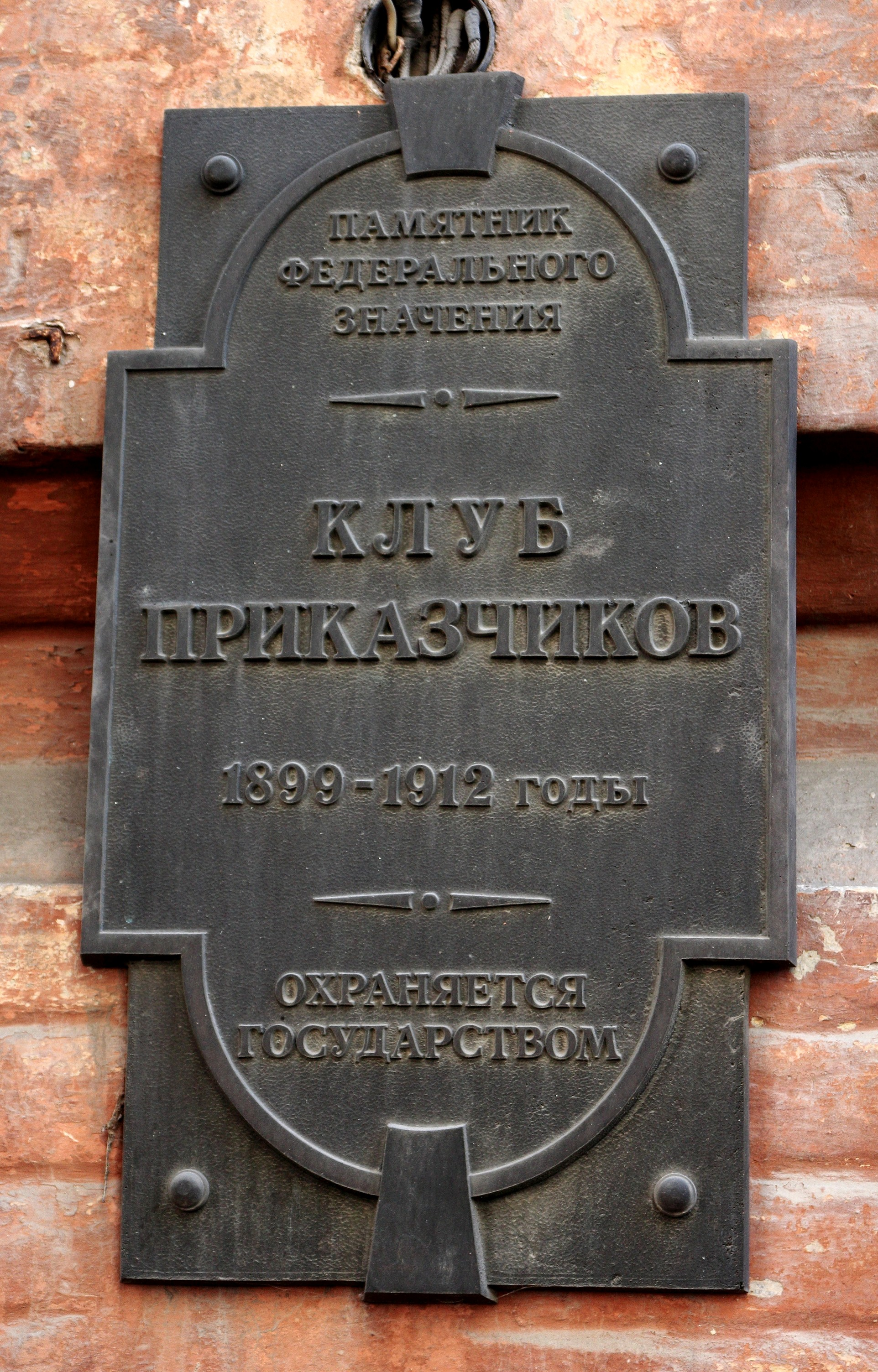 Клуб приказчиков (Дом, в котором проходил I съезд Советов Донской Советской республики): улица Серафимовича, 88, Ростов-на-Дону, Ростовская область